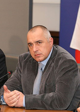 Boyko M. Borisov, EPP Bulgaria